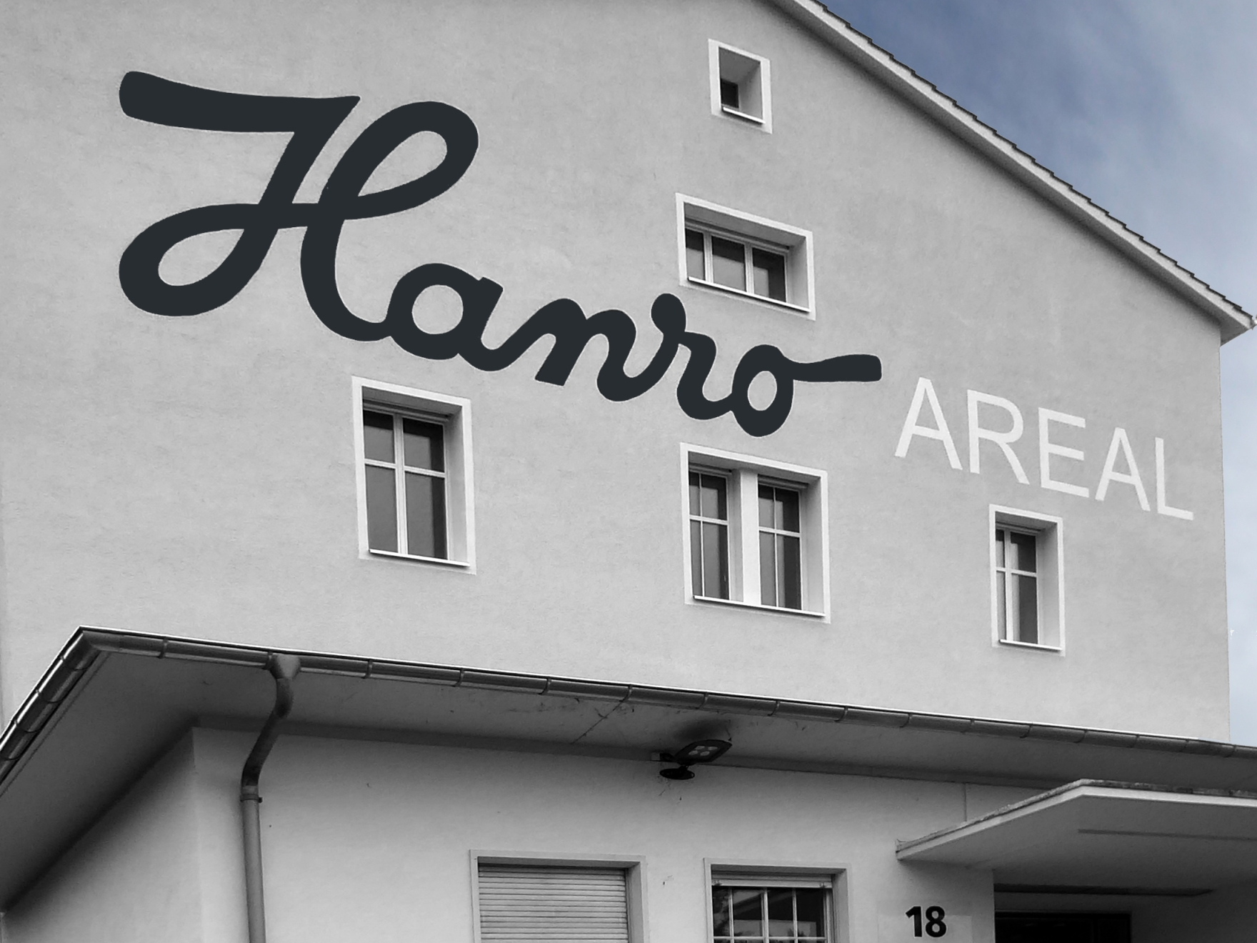 Hanro-Sammlung, Liestal, Switzerland